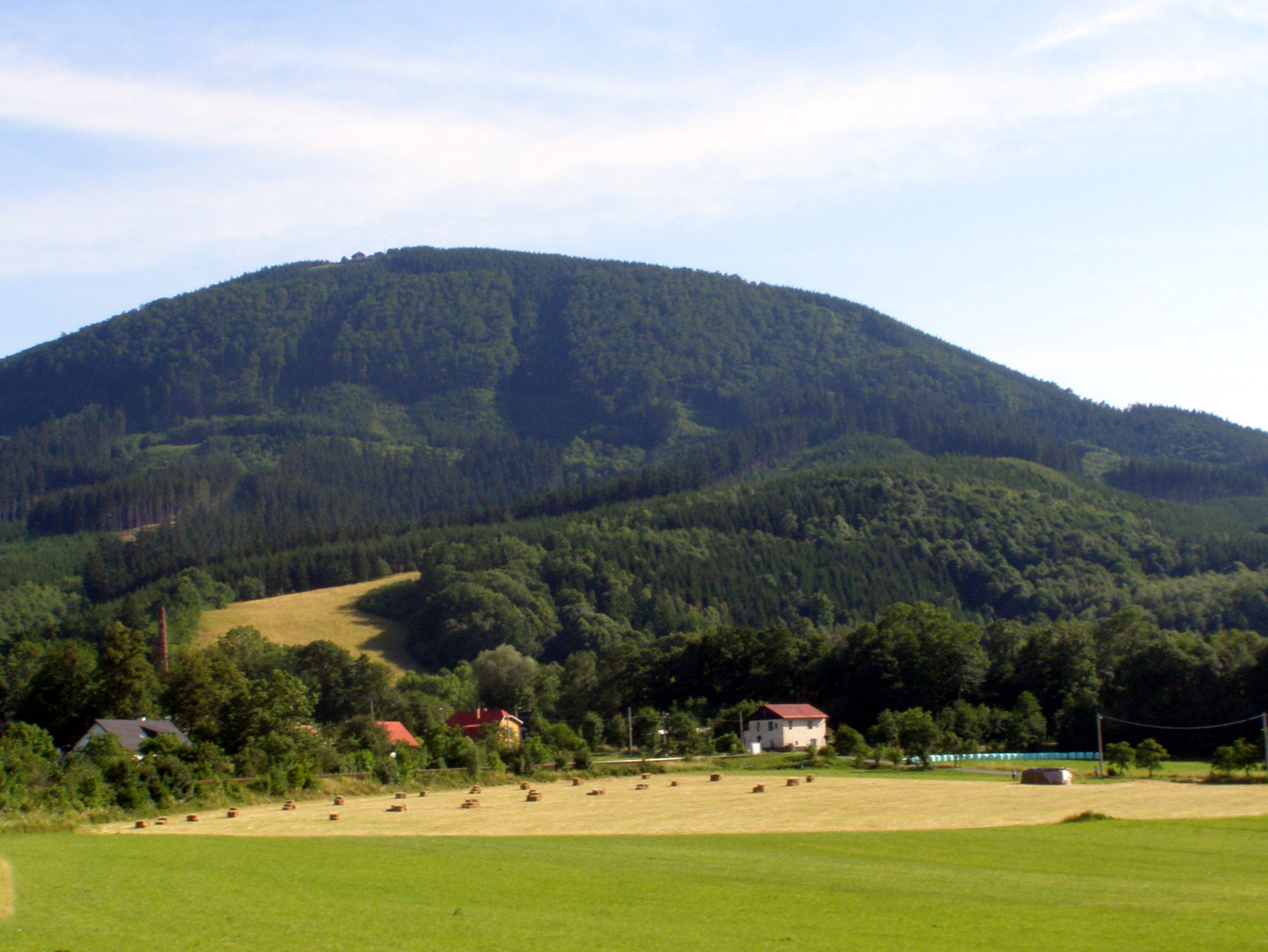 Velký Javorník (918 m), pohled ze severu